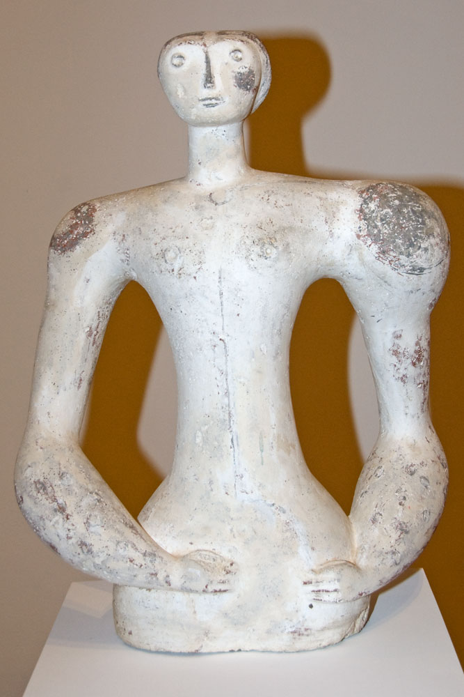 Torso de piedra artificial de color blanco y 75 cm de altura, realizado por Antonio Cano en 1965 y actualmente es de propiedad del autor.